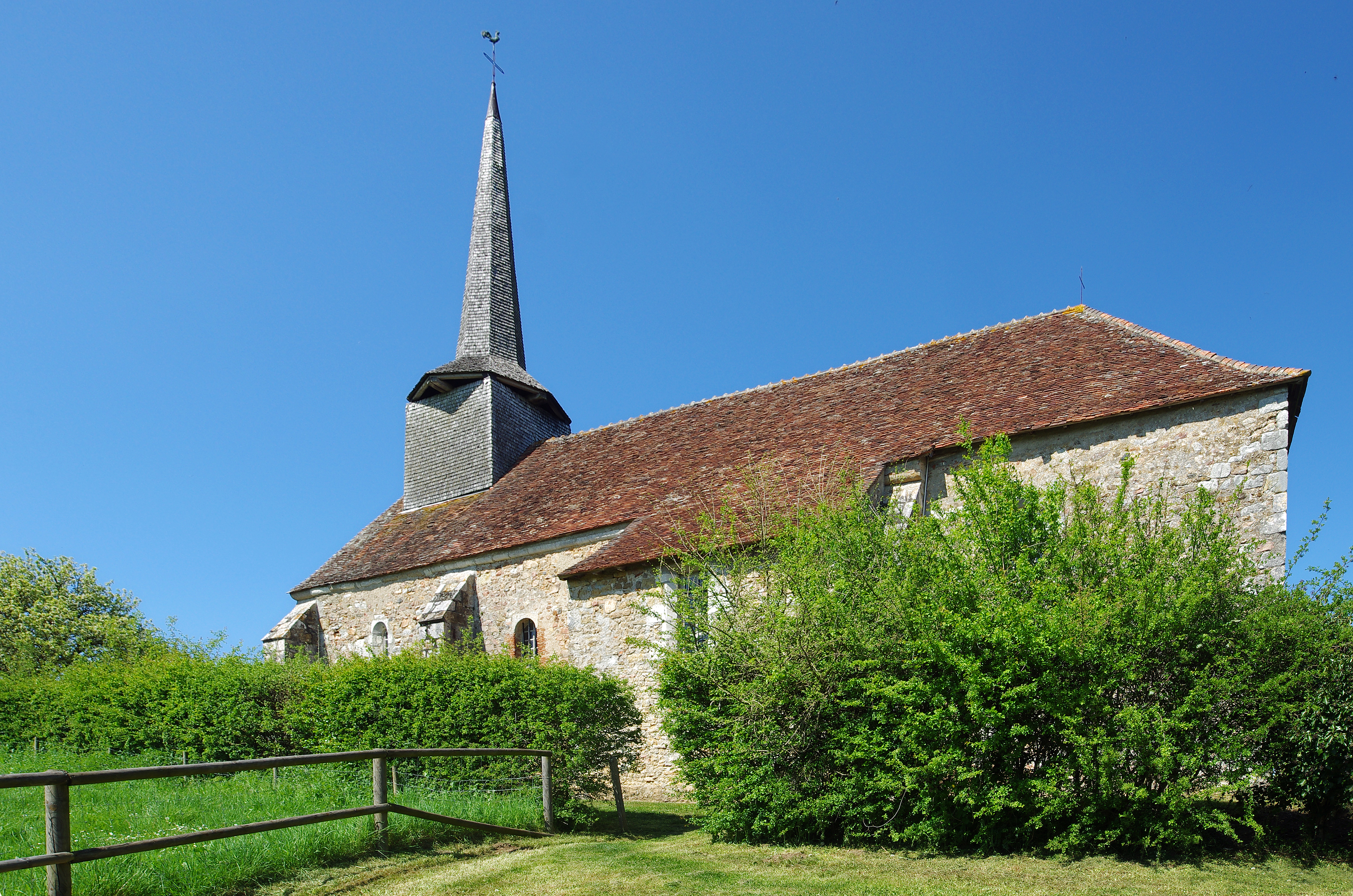 Ceaulmont (Indre). Eglise Saint-Sarurnin (13e siècle ; 17e siècle). La façade sud.